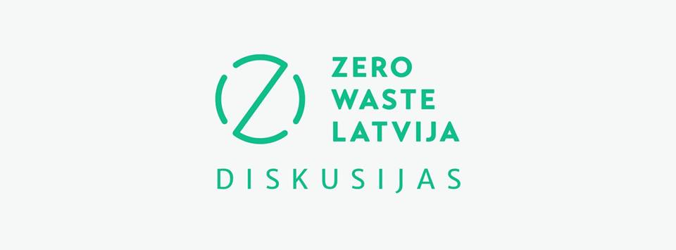 Facebook grupas "Zero Waste Latvija diskusijas" titulattēls